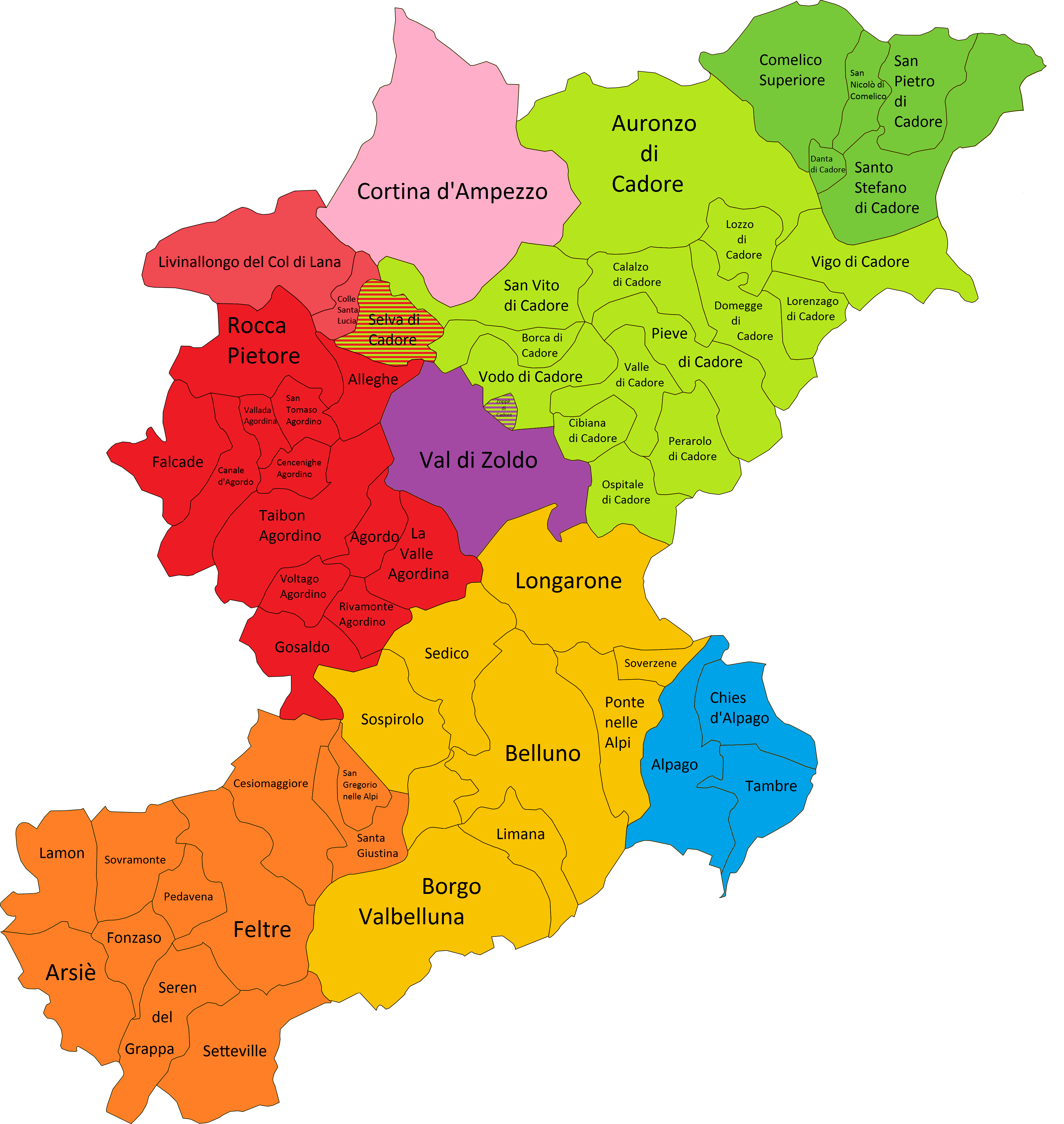 Mappa della provincia di Belluno suddivisa per aree storico-culturali